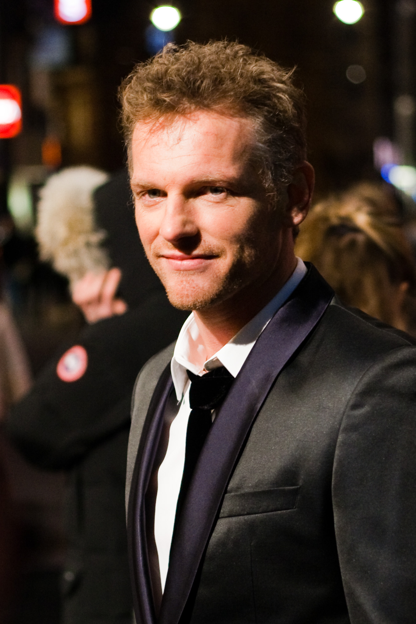 Barry Atsma (Bromley (Engeland), 29 december 1972) is een Nederlands acteur. -- Barry Atsma tijdens première van de film Zwart Water in Tuschinsky, Amsterdam